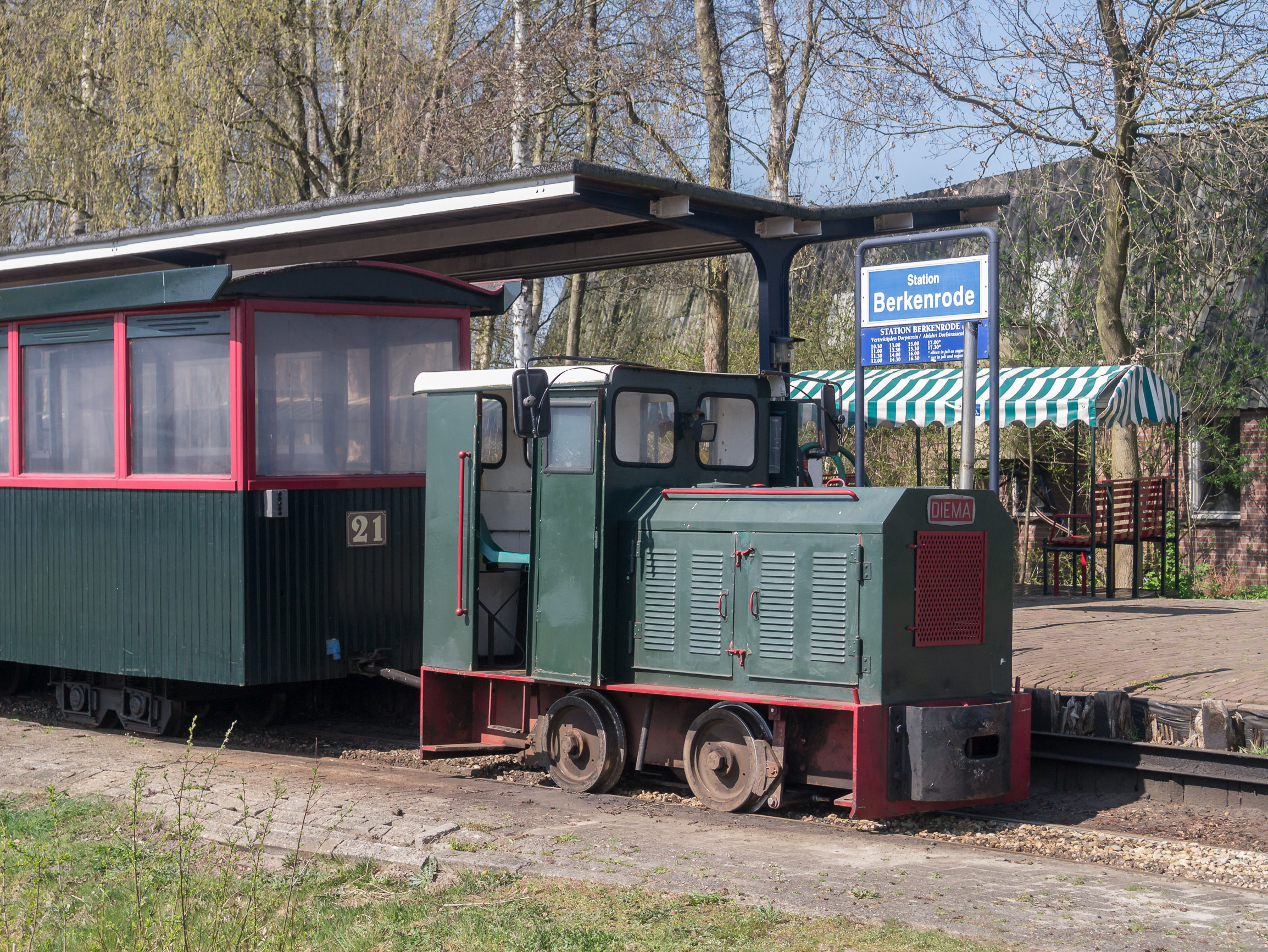 Diema Locomotief in het veenpark Barger-Compascuum